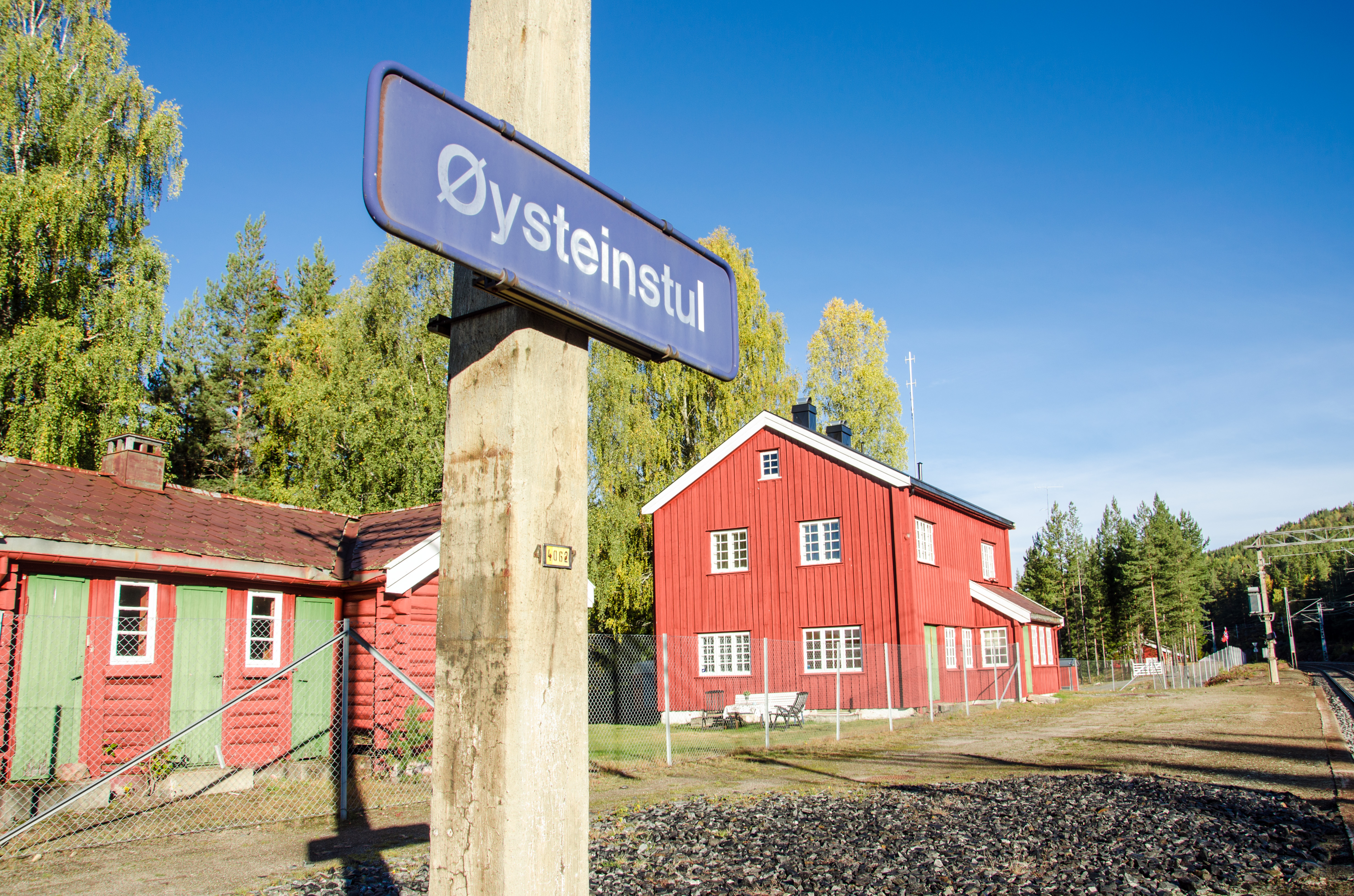 Øysteinstul stasjon på Sørlandsbanen